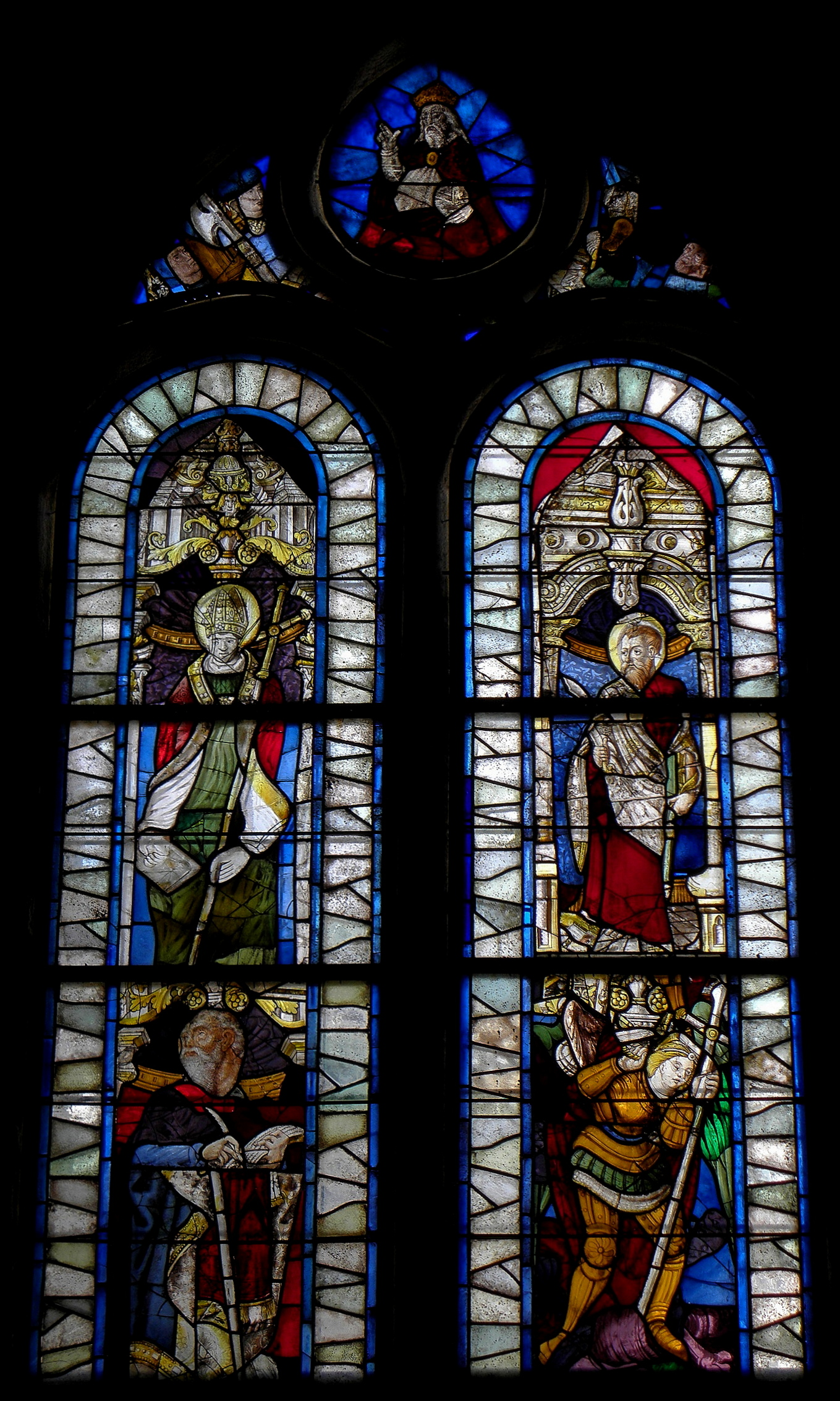 Baie 06 de la chapelle Notre-Dame de Kergoat en Quéménéven (29).